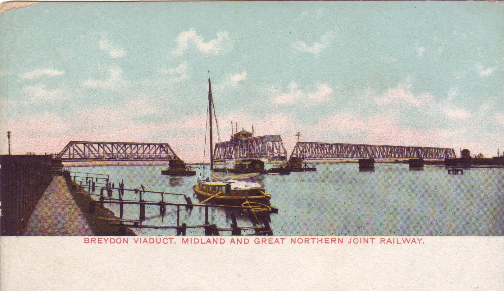 Breydon Viaduct